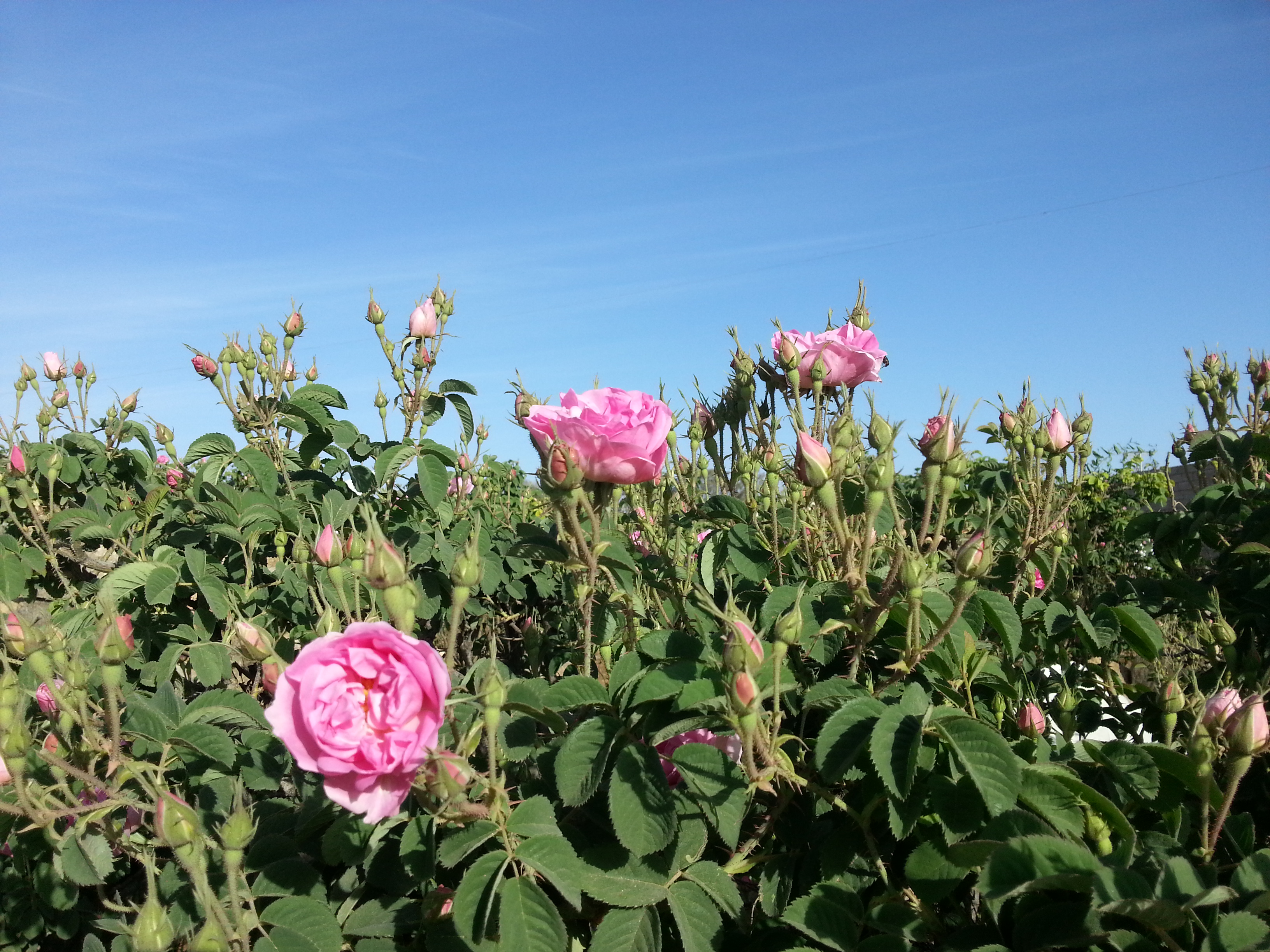 صورة لورد الطائف والمشهور بجودته وإرتفاع أسعاره حيث تبلغ قيمة 1000 ملل ما بين 1200 إلى 3000 ريال سعودي .